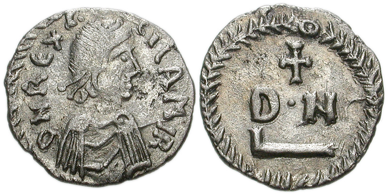 Münze: 50 Denari Silber, Gelimer, König der Vandalen, um 530, Münzstätte Karthago, Beschriftung: D N REX G-EILAMIR